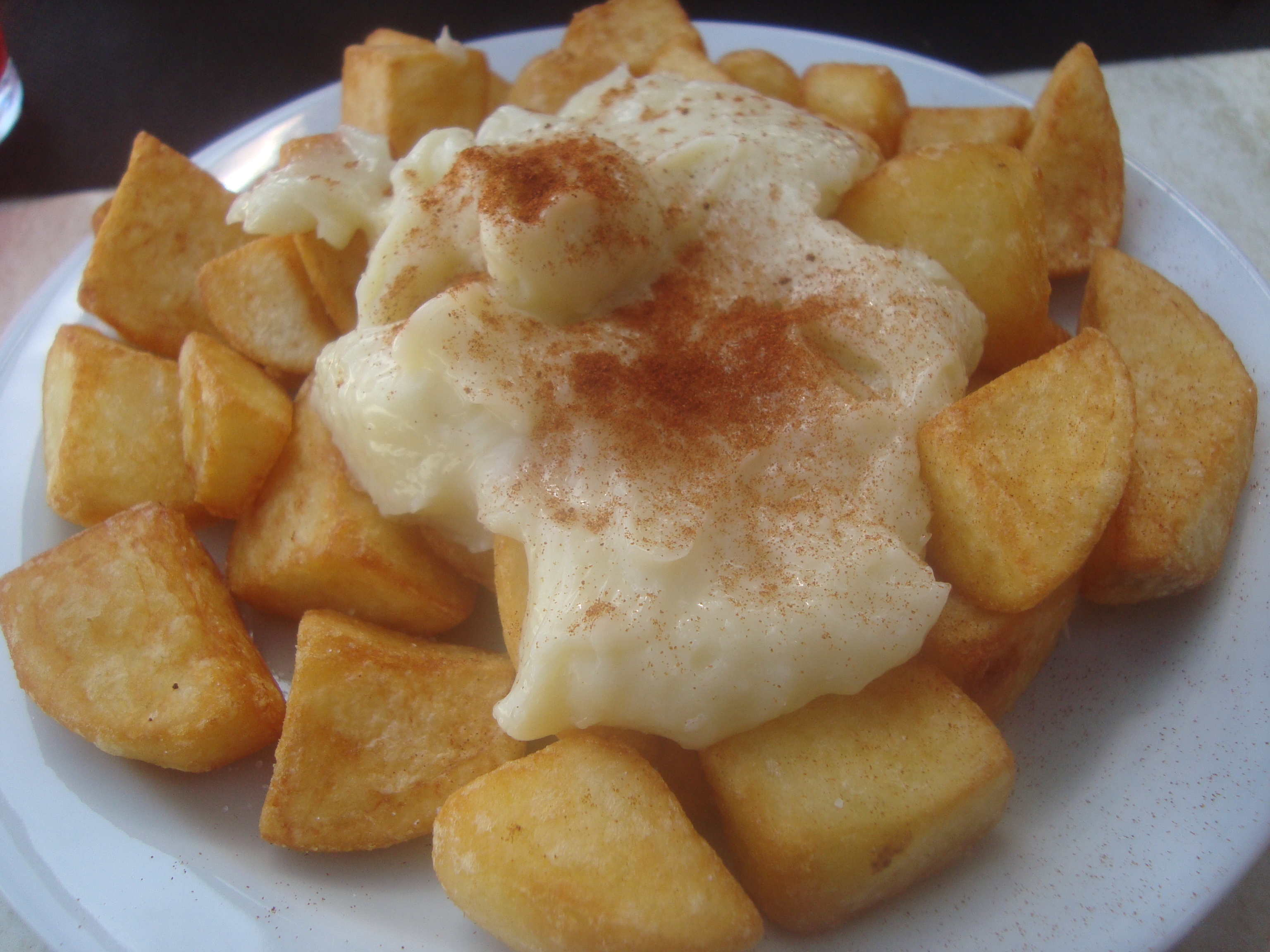 Patatas con "allioli" (ajoaceite).